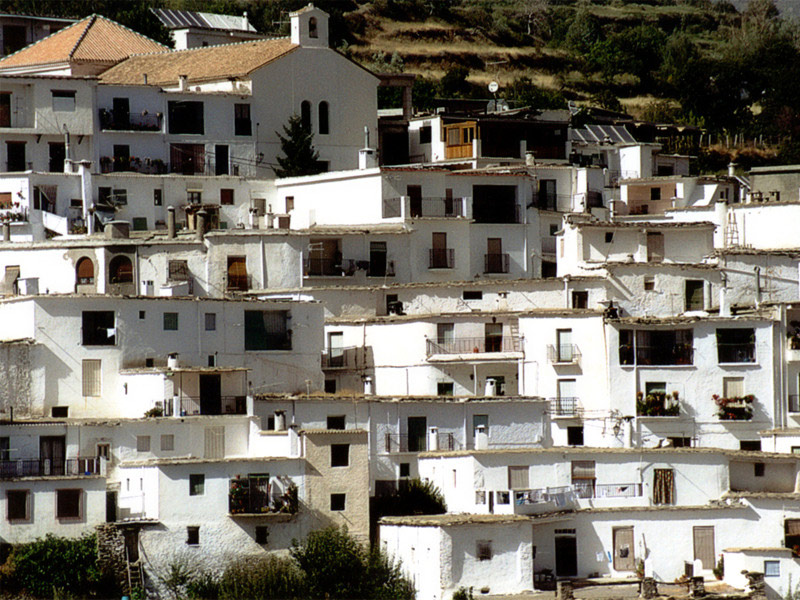 Trevélez, Granada, España.